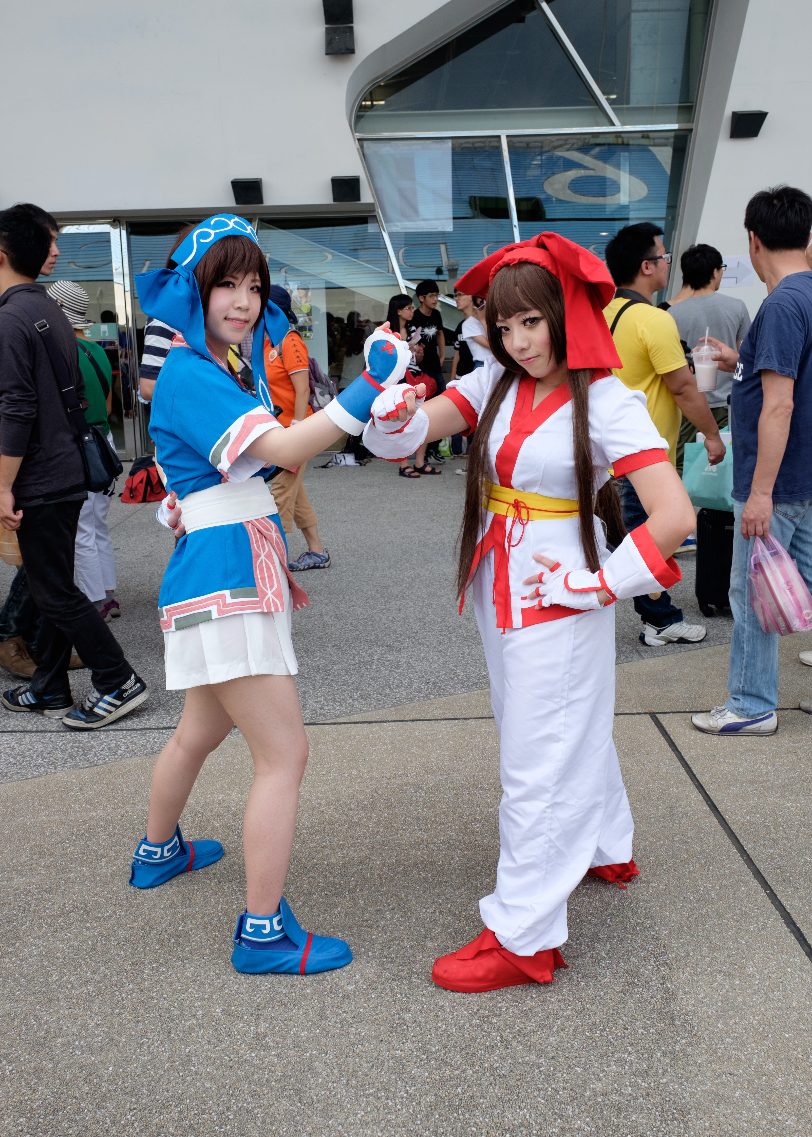 PF24第一日下午，SNK＜サムライスピリッツ 斬紅郎無双剣＞ナコルル（右）與リムルル（左）cosplayers。